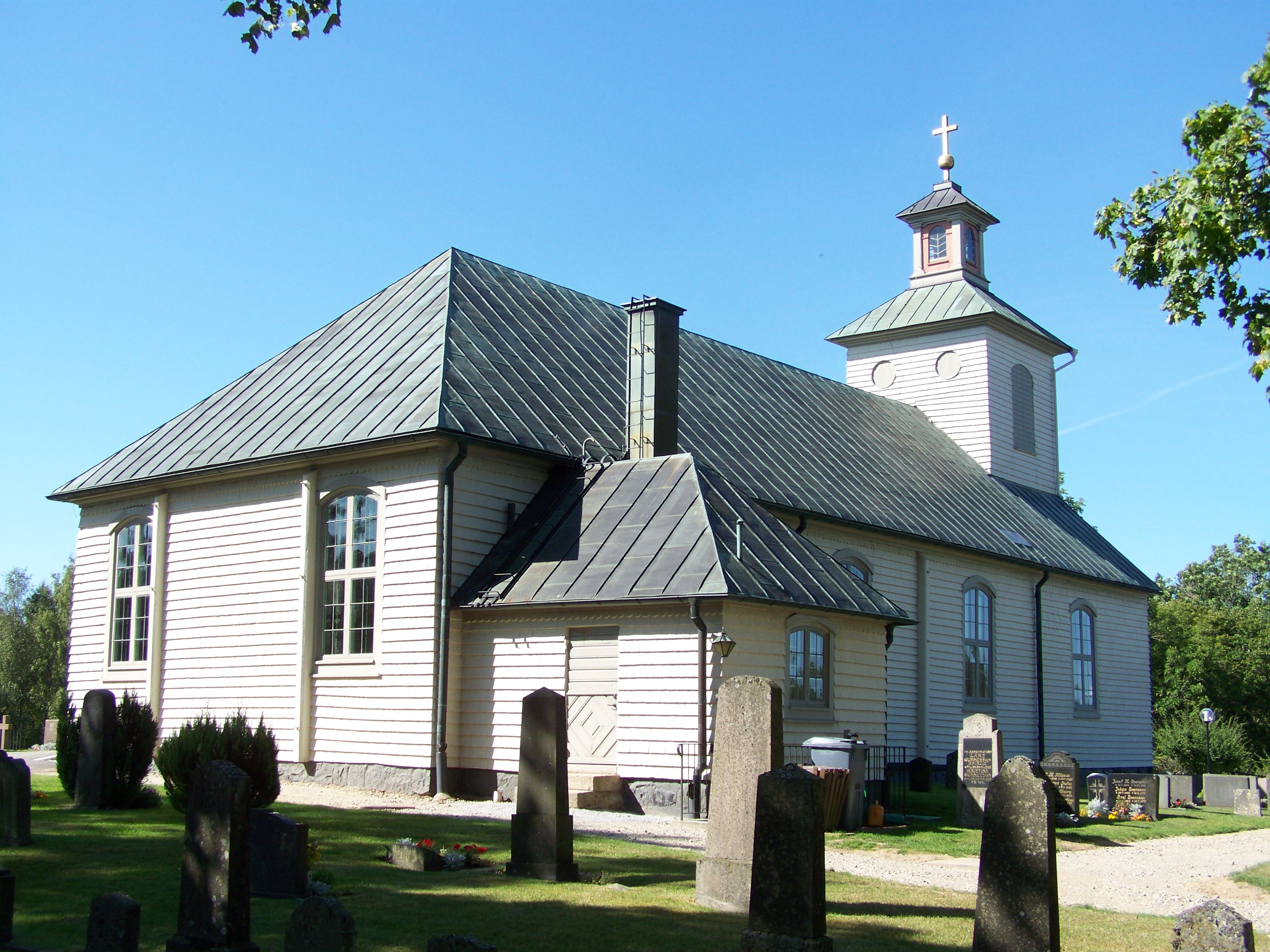 In Kallinge, Schweden. Härlunda kyrka